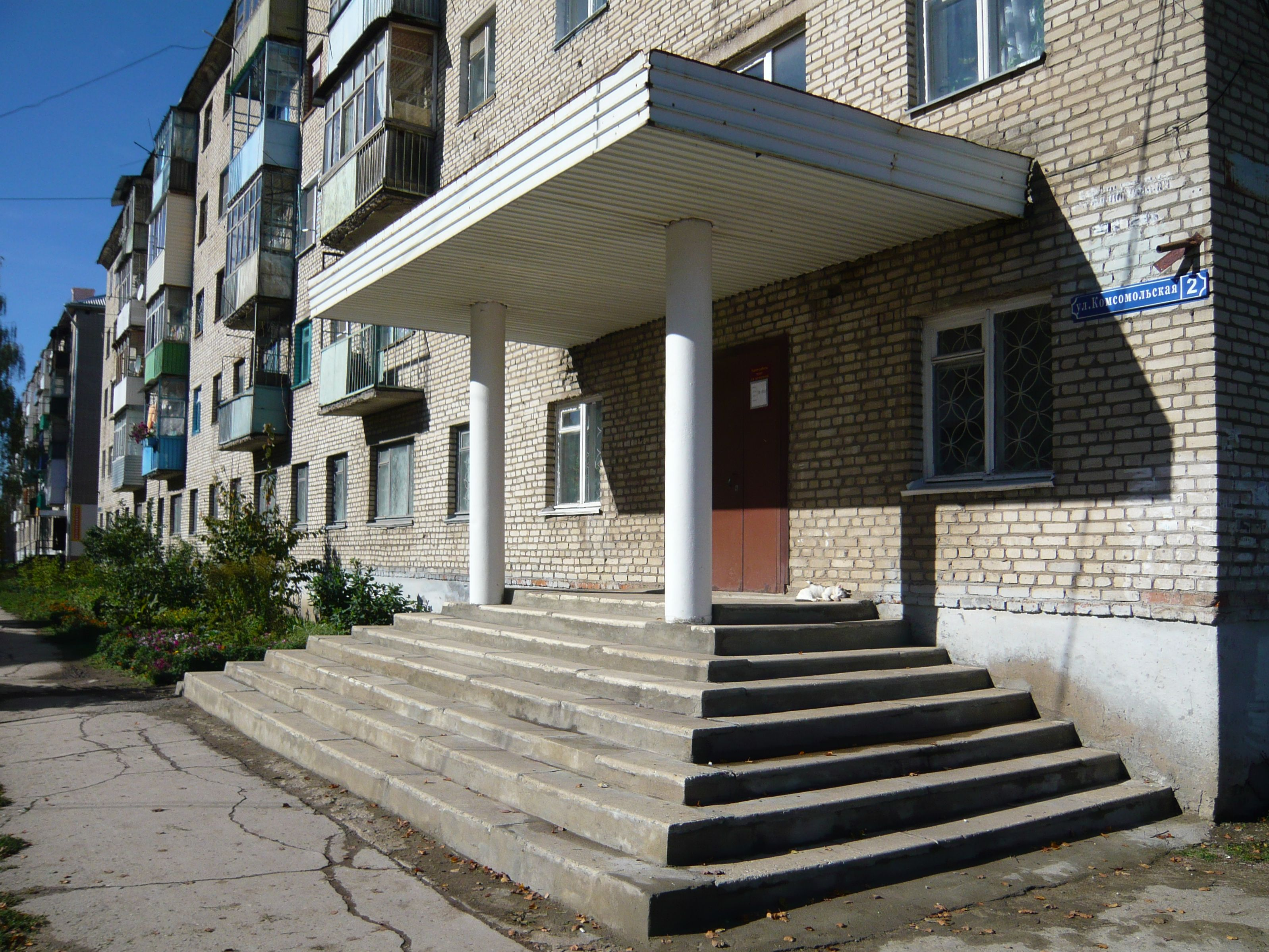 г. Ясногорск, Тульская область. Районный краеведческий музей